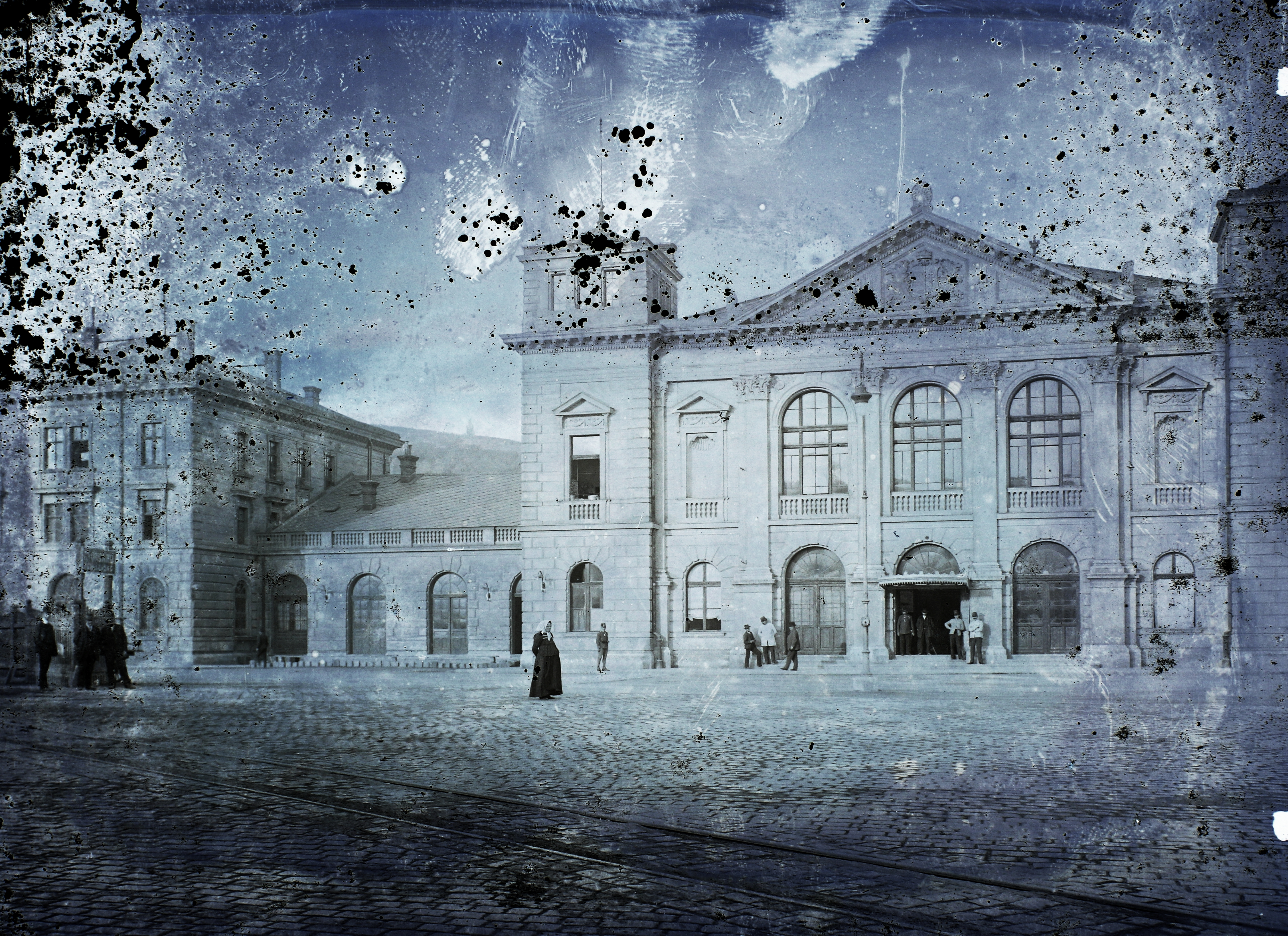 főpályaudvar. Location: Slovakia, Bratislava Tags: train station, cobblestones, damaged photo Title: főpályaudvar.